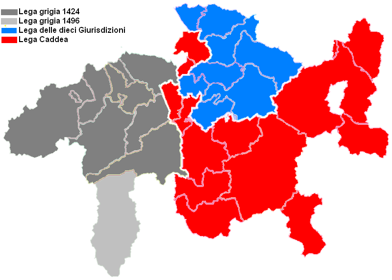 Il file originale è stato modificato dall'utente che l'ha caricata e rilasciata come: L'immagine originale è licenziata in